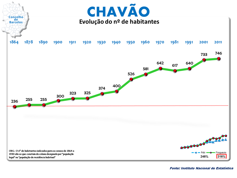 Censos 1864/2011